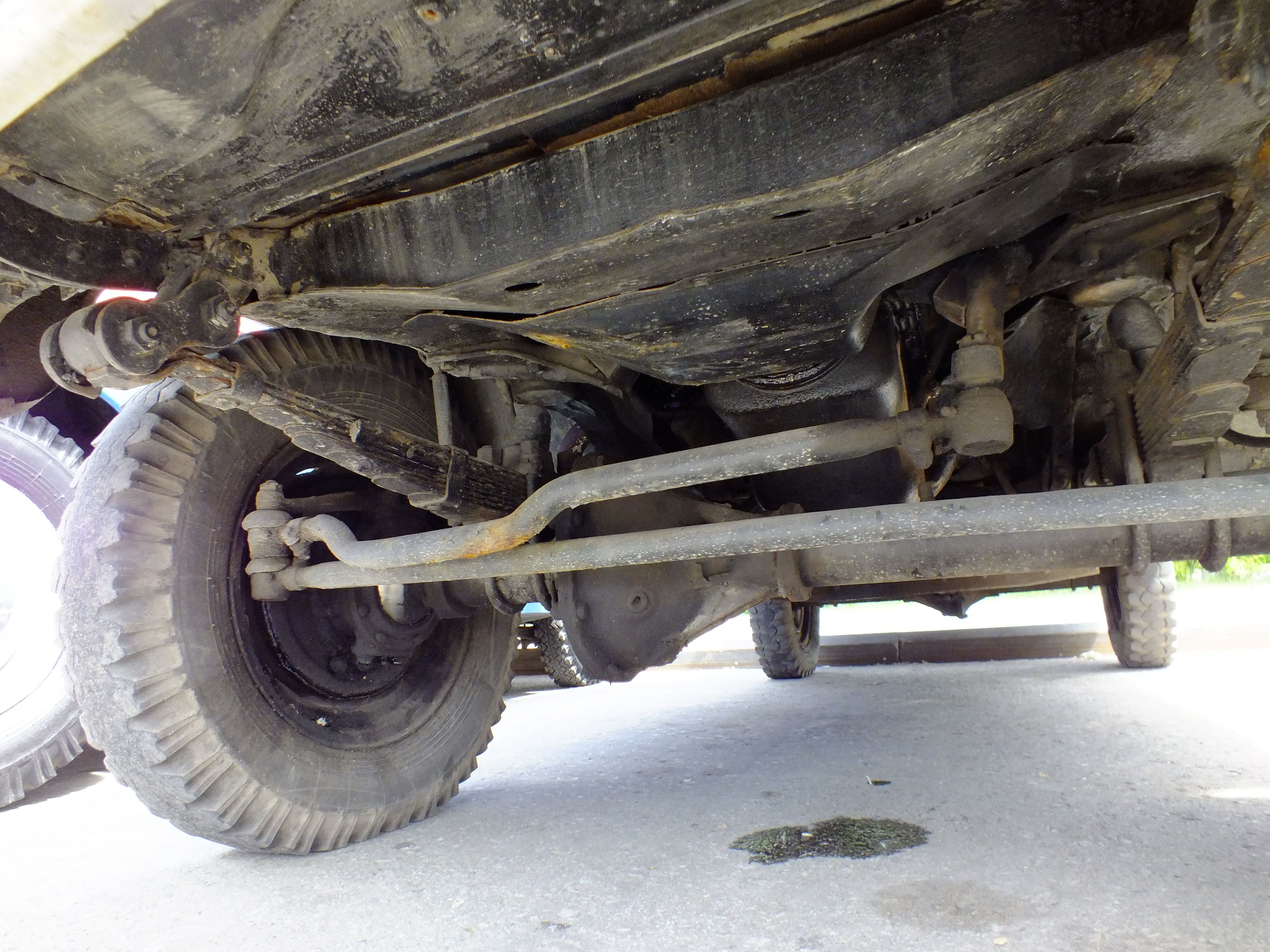 GAZ-M-72